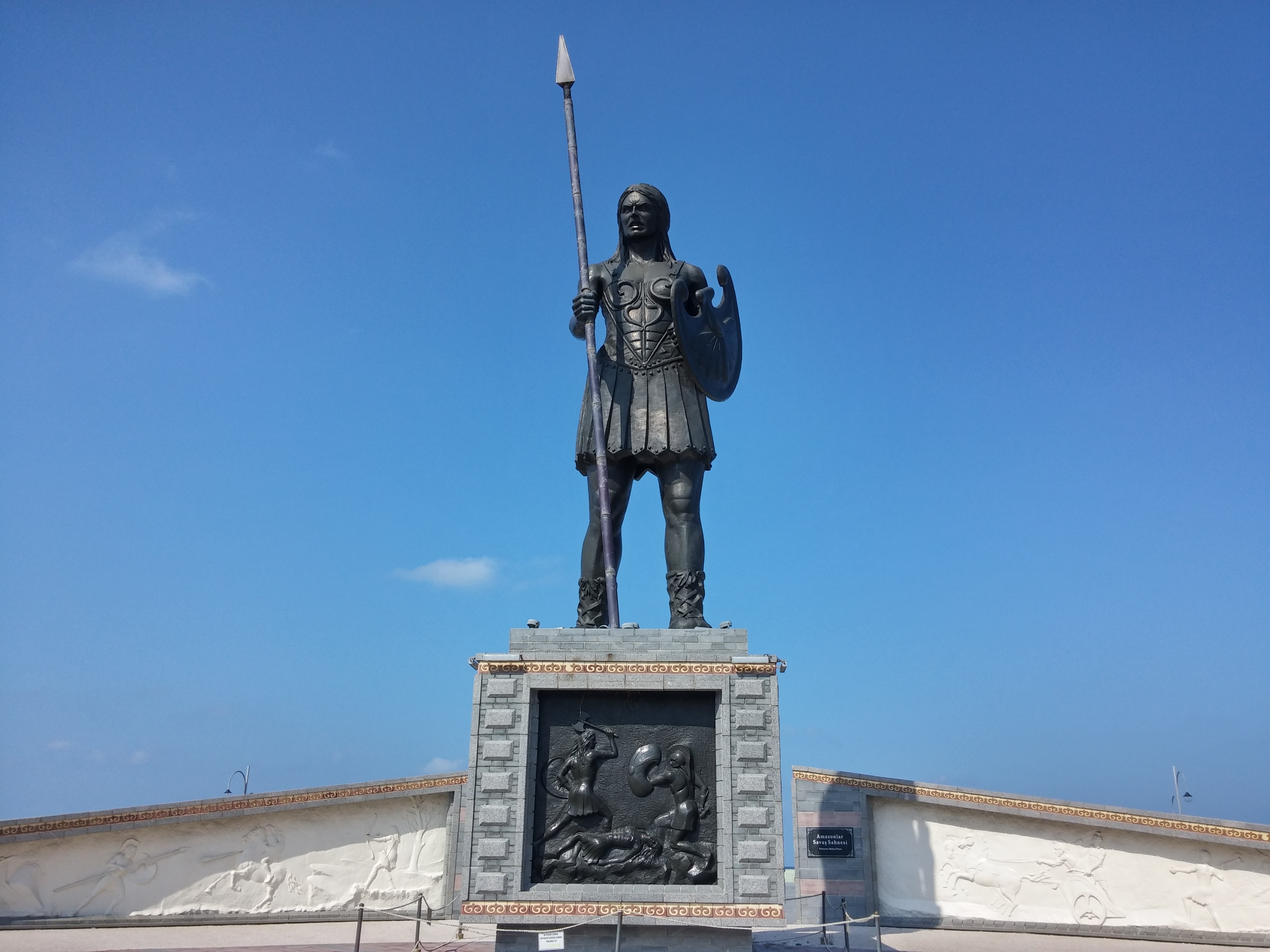 Samsun'un Atakum ilçesindeki Amazon Parkı'nda yer alan Amazon Anıtı.